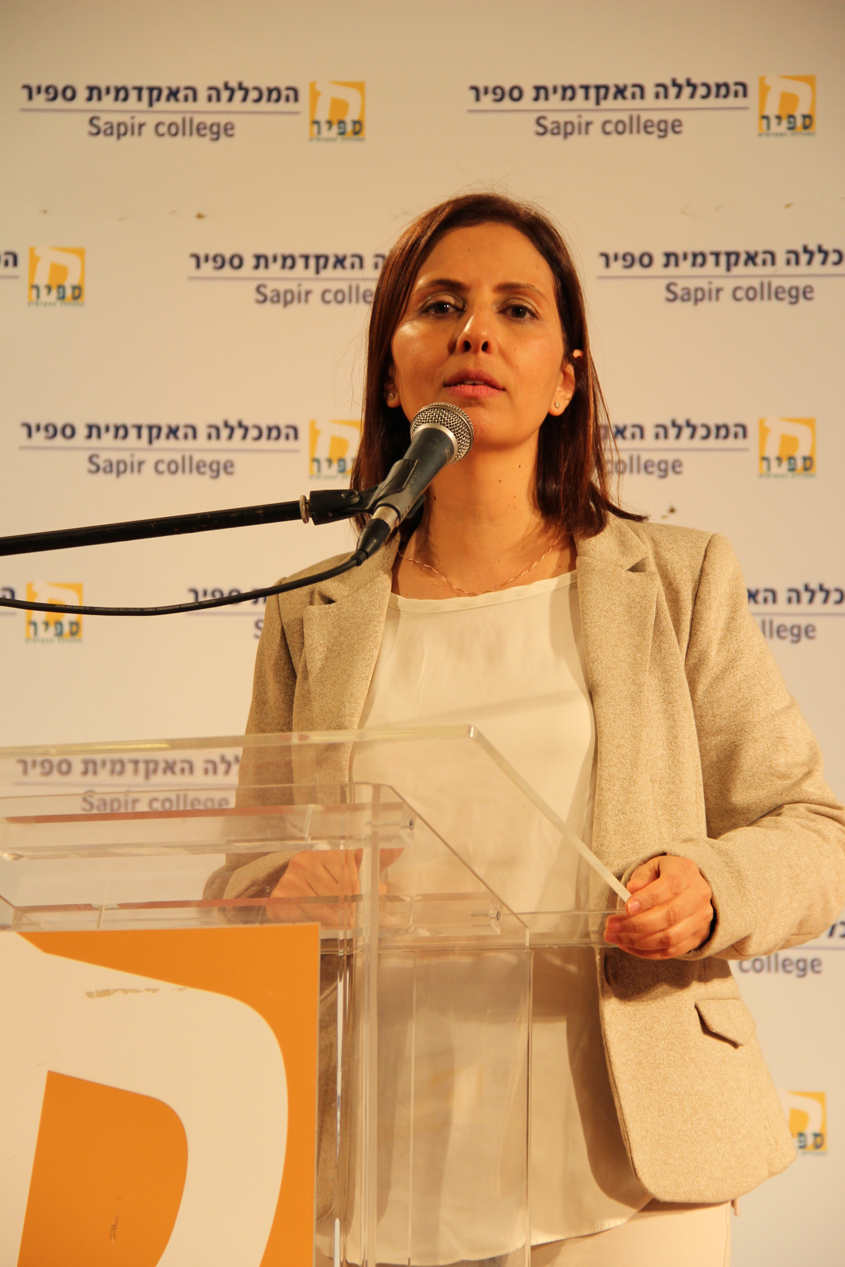 כנס שדרות לחברה במכללה האקדמית ספיר ובעיר שדרות 2015